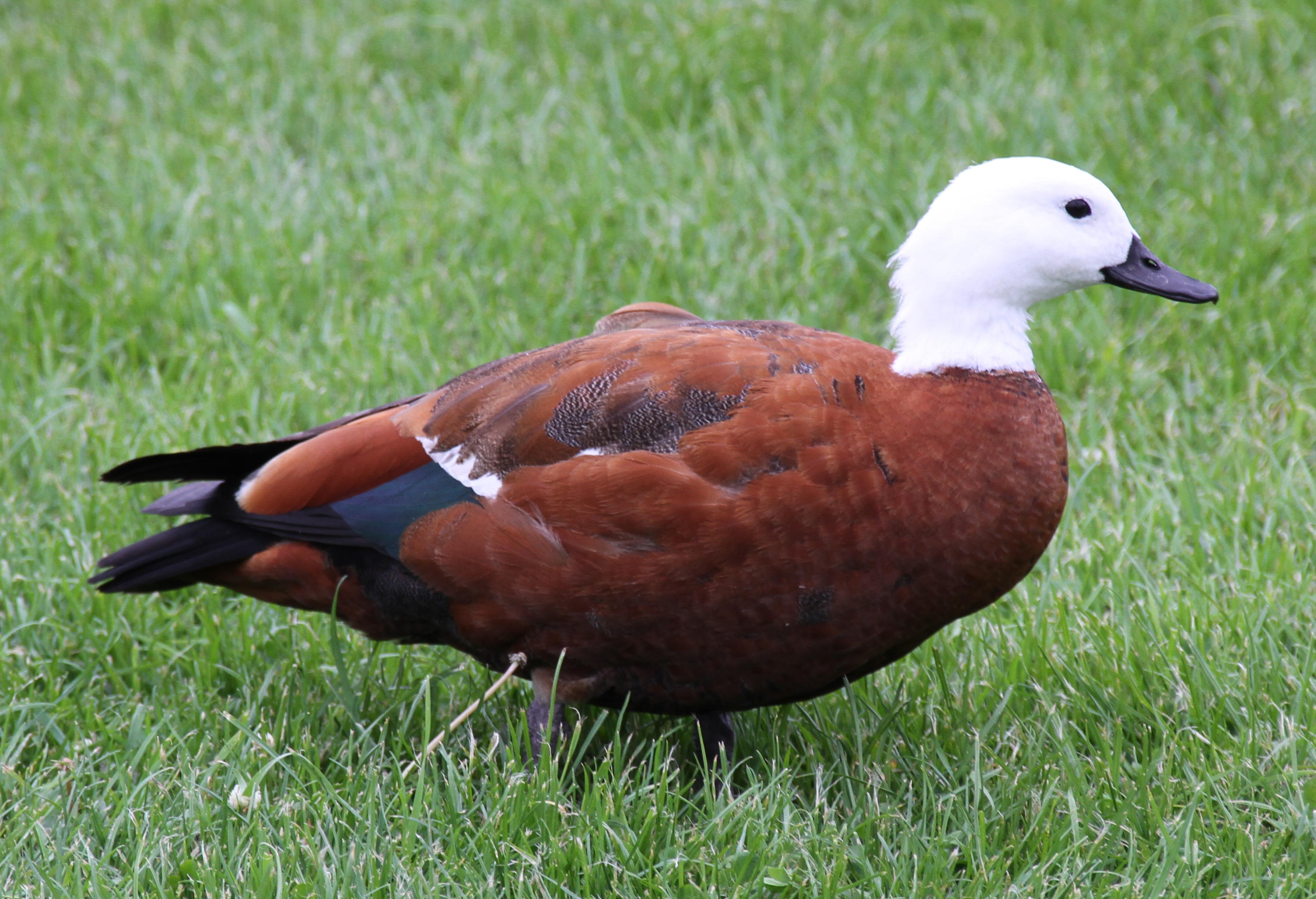 Female Paradise duck 2